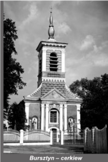 Бурштин фото 1970 років або давніше 1920-30 років